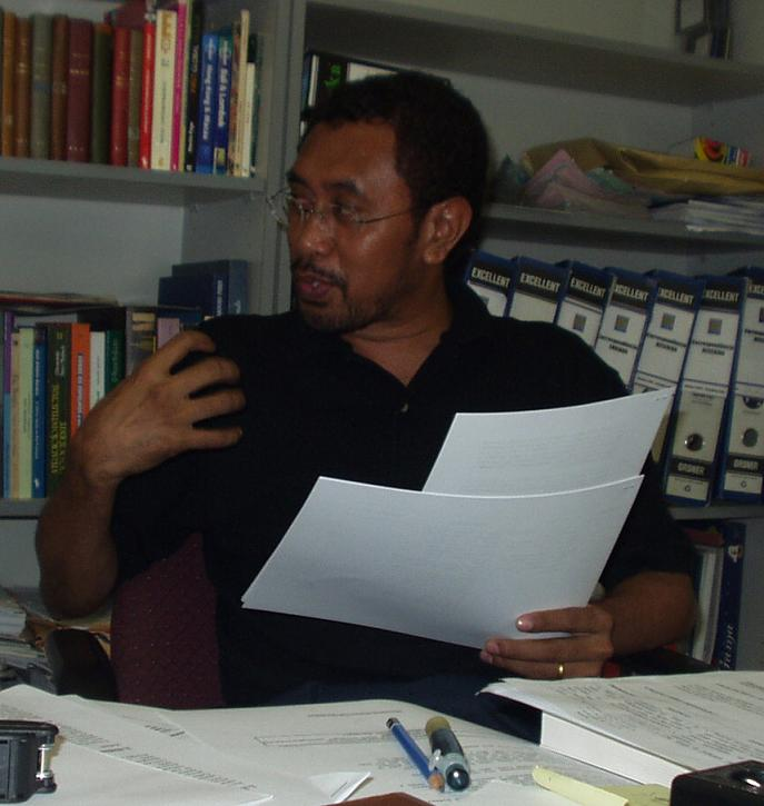 Benjamim Corte-Real, Rector of Universidade Nacional de Timor Lorosa’e (UNTL). Photo by João Paulo T. Esperança.